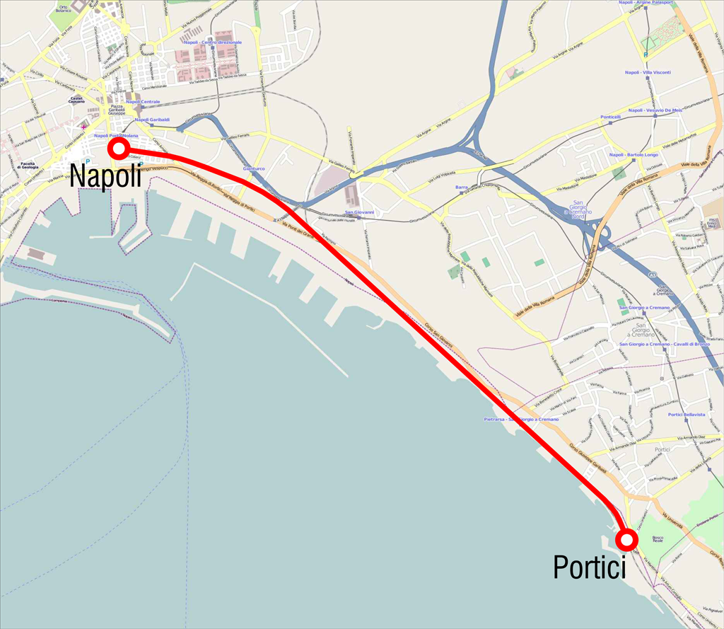 Mappa della ferrovia Napoli-Portici all'epoca dell'inaugurazione (1839)